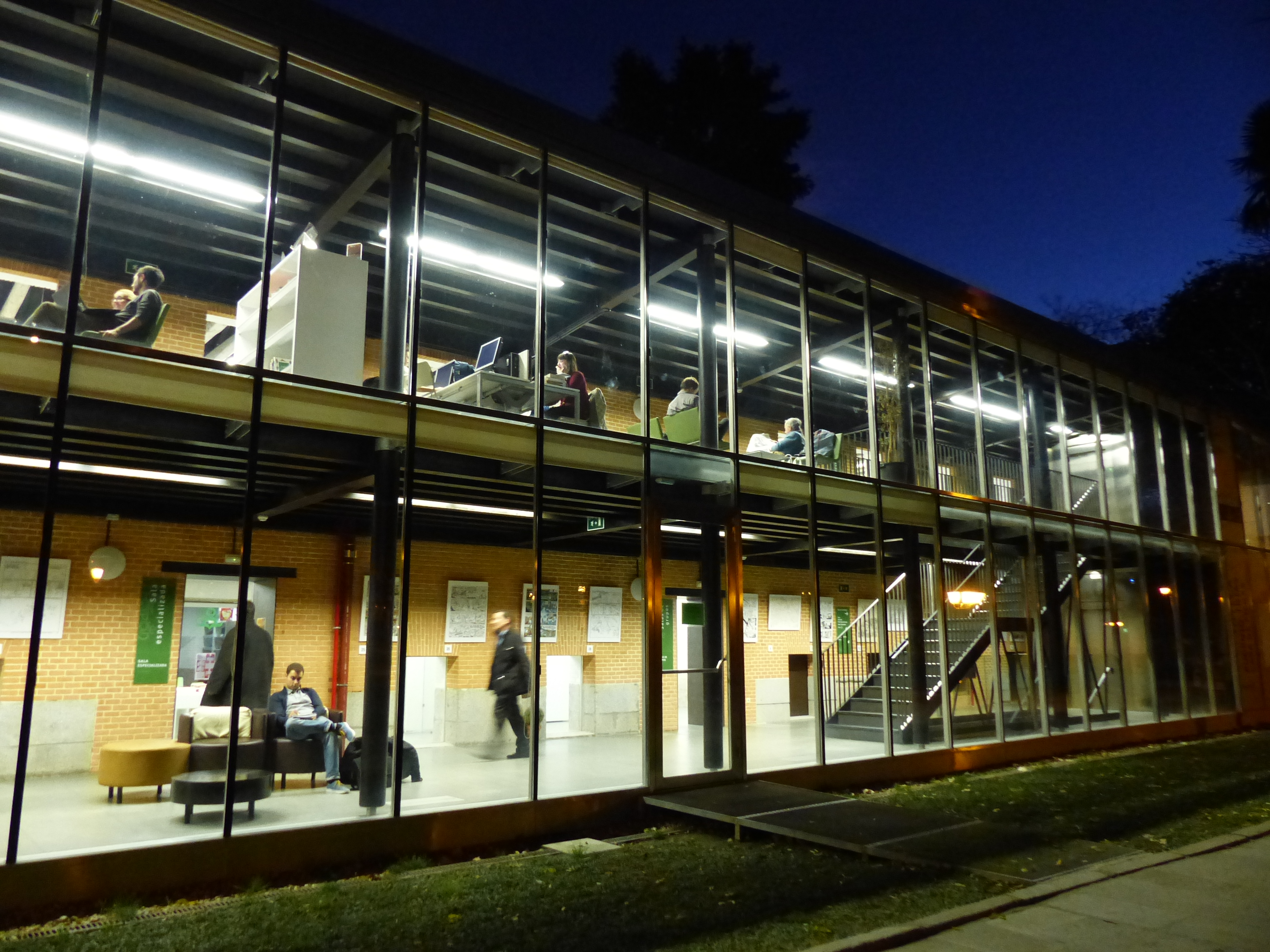 Biblioteca Pública Retiro, vista.